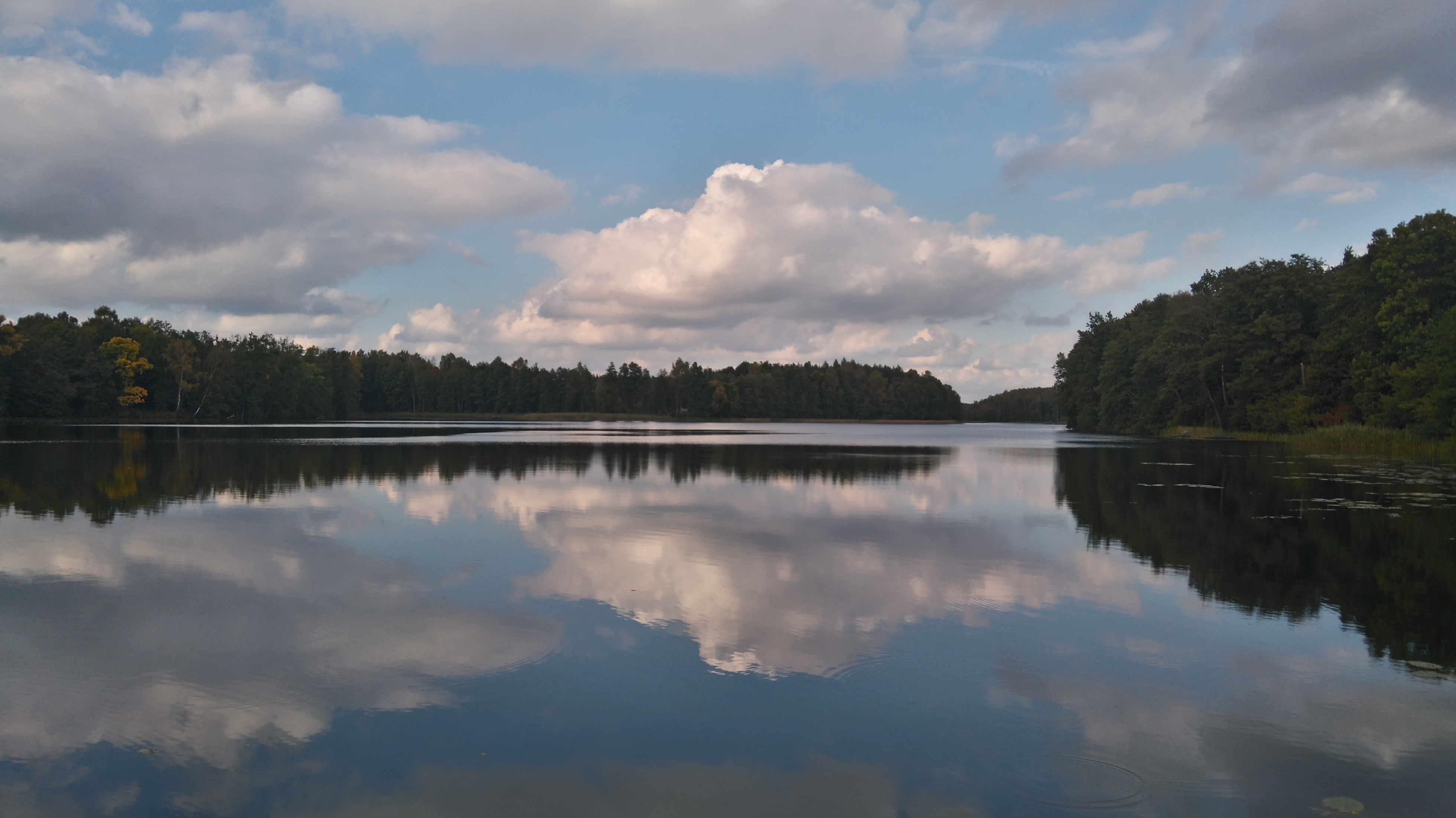 Jezioro Borówno - jesienny widok od strony wsi Kujan (fot. Paweł M. Owsianny, 02.10.2016)